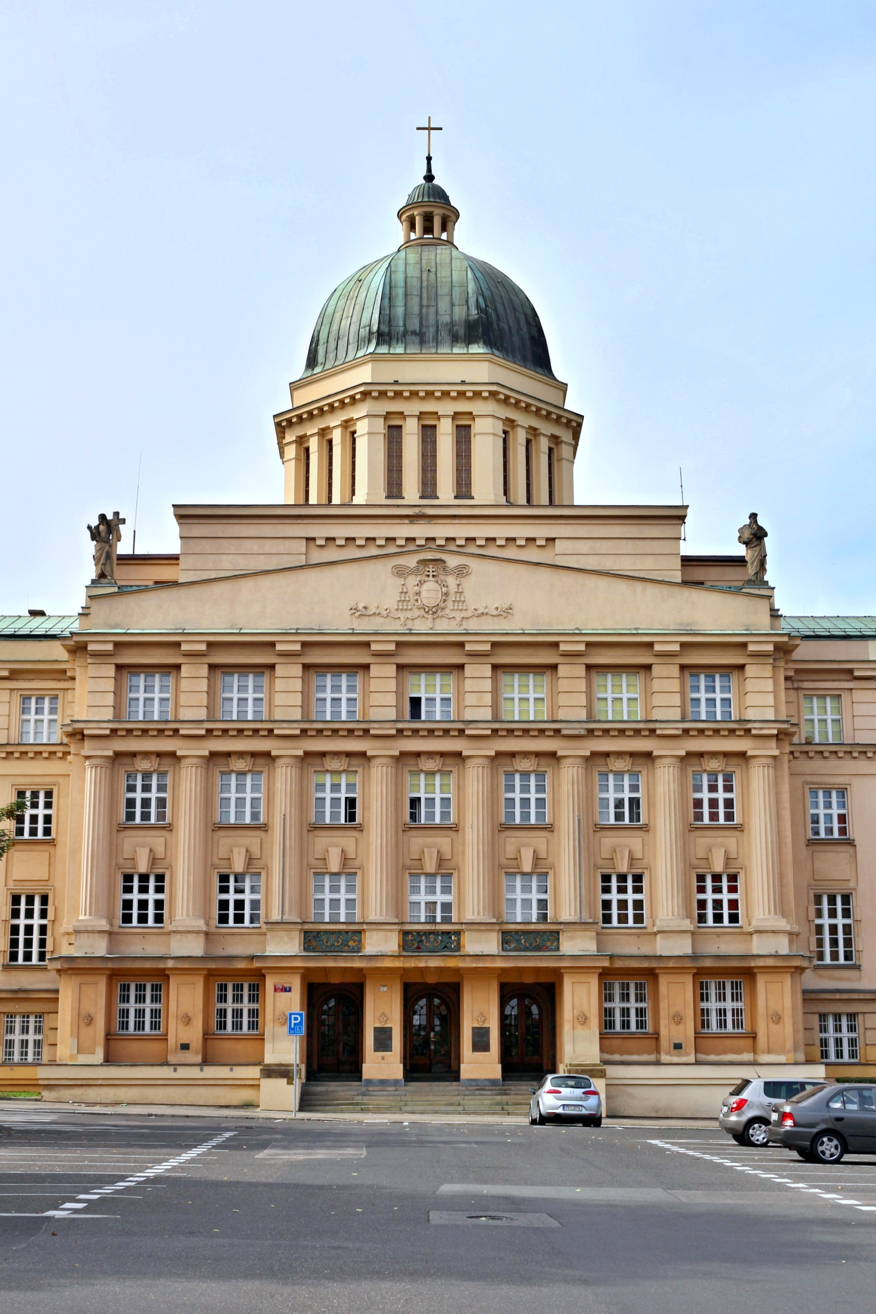 Arcibiskupský seminář v Praze-Dejvicích